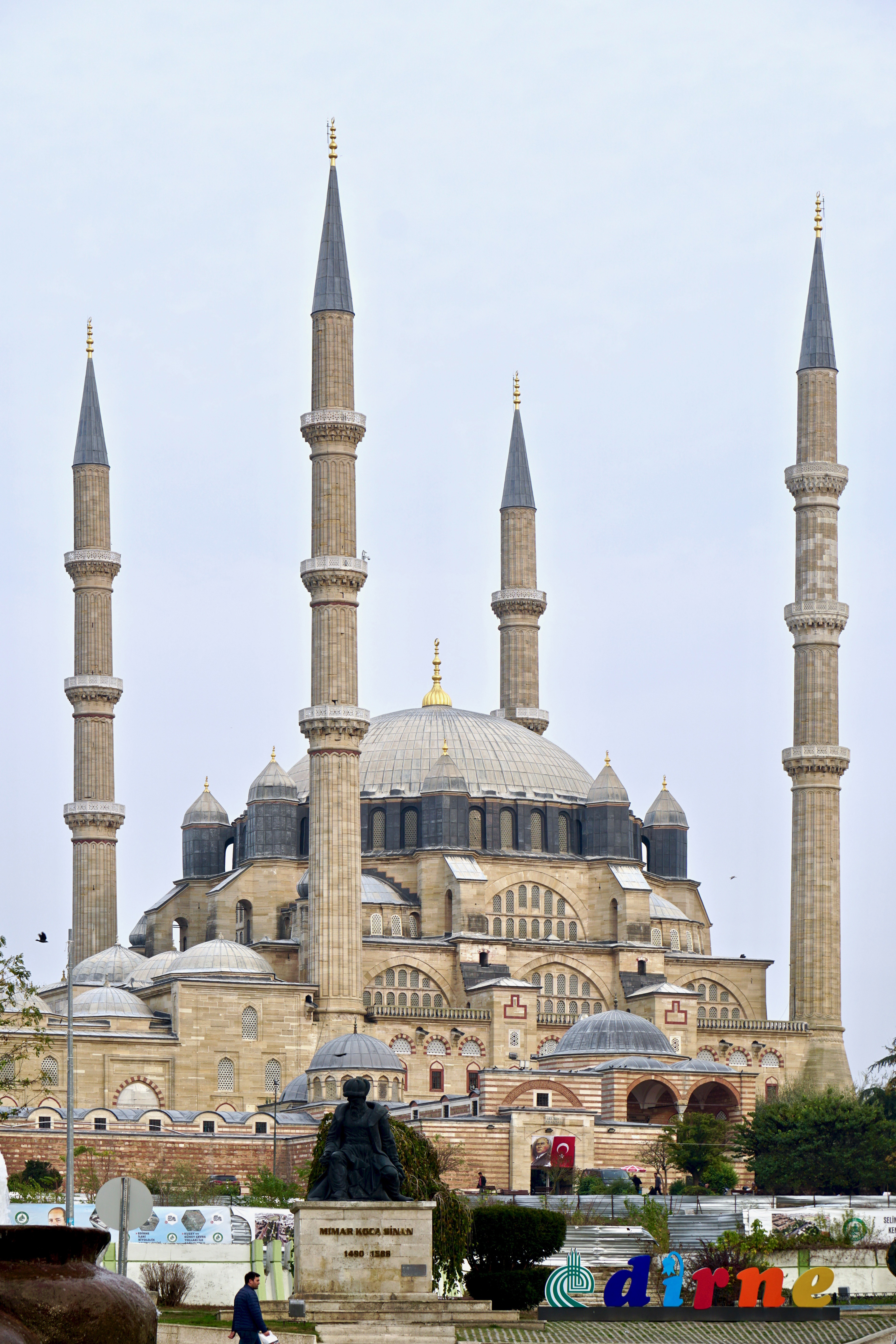 外観(遠景)